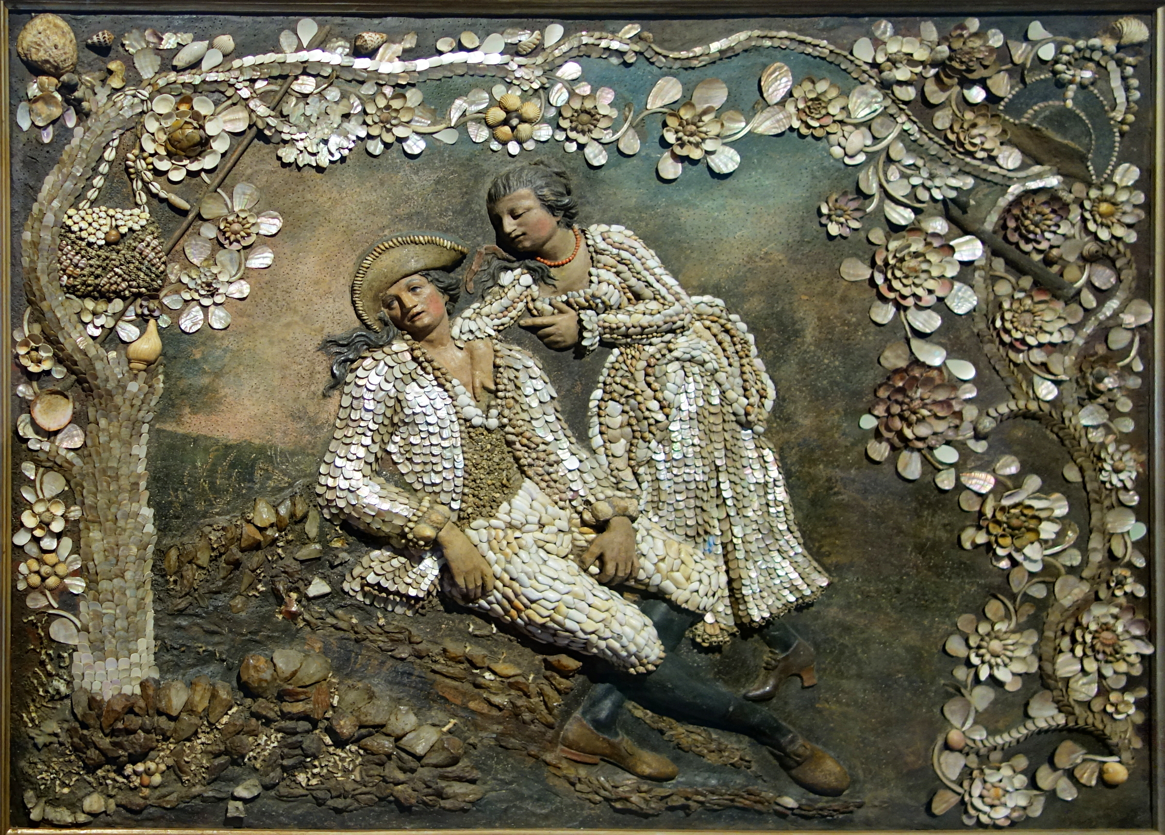 Scène pastorale, collection particulière.